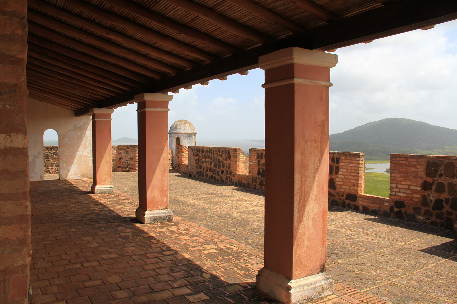 Castillos de Guayana frente al Rio Orinoco "Fuerte Campo Elias" o Castillo de San Diego de Alcala, en el municipio Casacoima Estado Delta Amacuro Venezuela